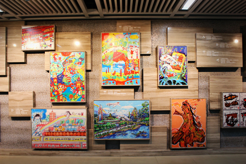 中文（中国大陆）: 武汉地铁2号线